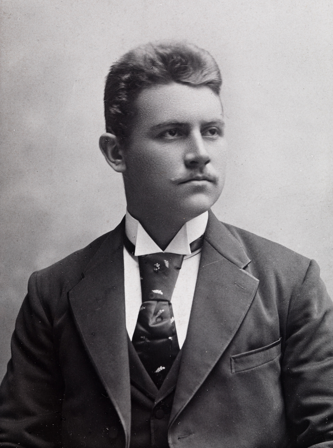 Tittel / Title: Portrett av Eivind Astrup (1871-1895) Motiv / Motif: Visittkort. Astrup var polarforsker og deltok i flere av Robert Pearys ekspedisjoner. Dato / Date: ukjent /unknown Fotograf / Photographer: Christian Gihbsson (Christiania) Sted / Place: Oslo Eier / Owner Institution: Nasjonalbiblioteket / National Library of Norway Lenke / Link: Bildesignatur / Image Number: blds_02930